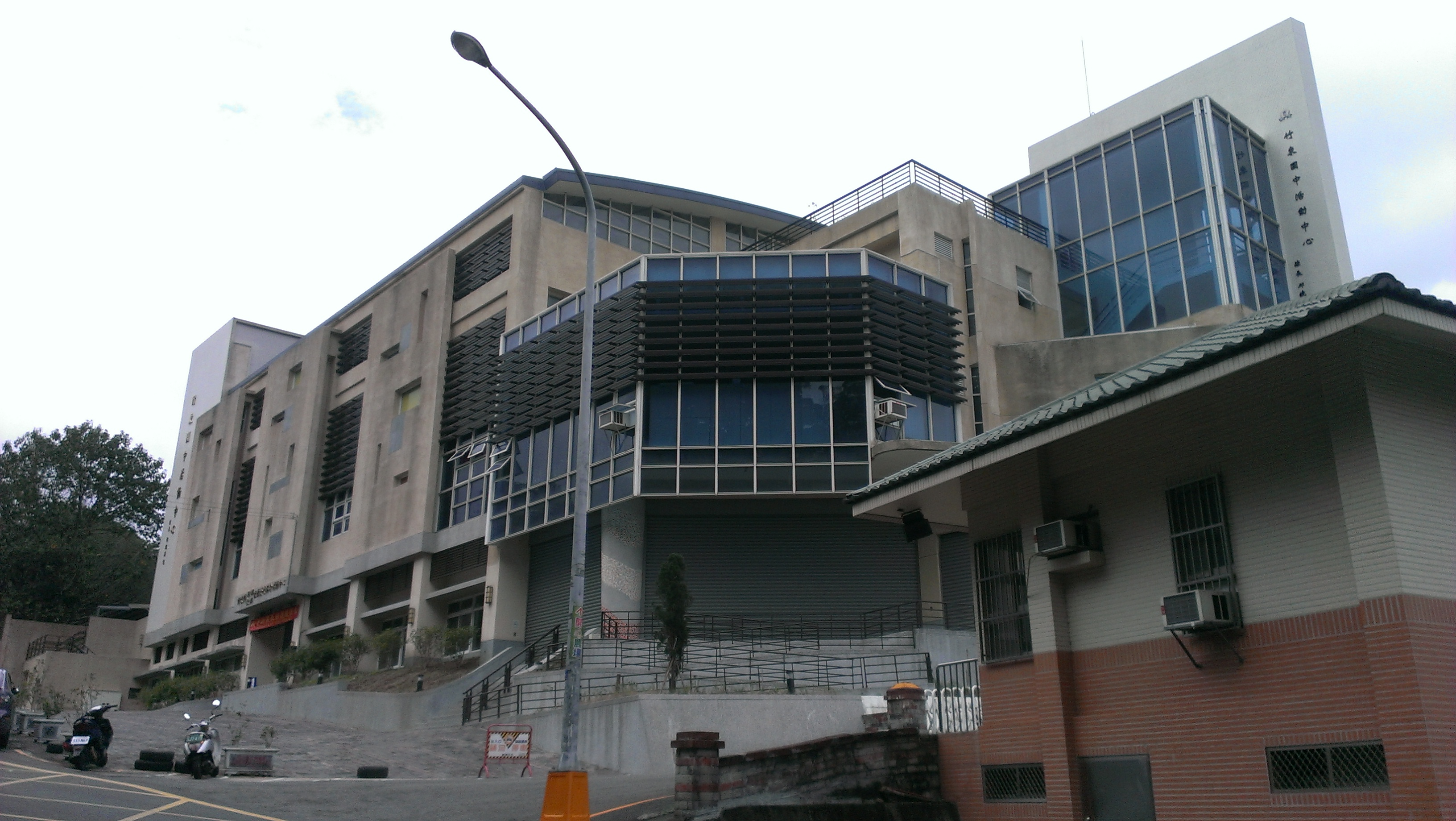 中文（台灣）: 新竹縣立竹東國民中學活動中心。